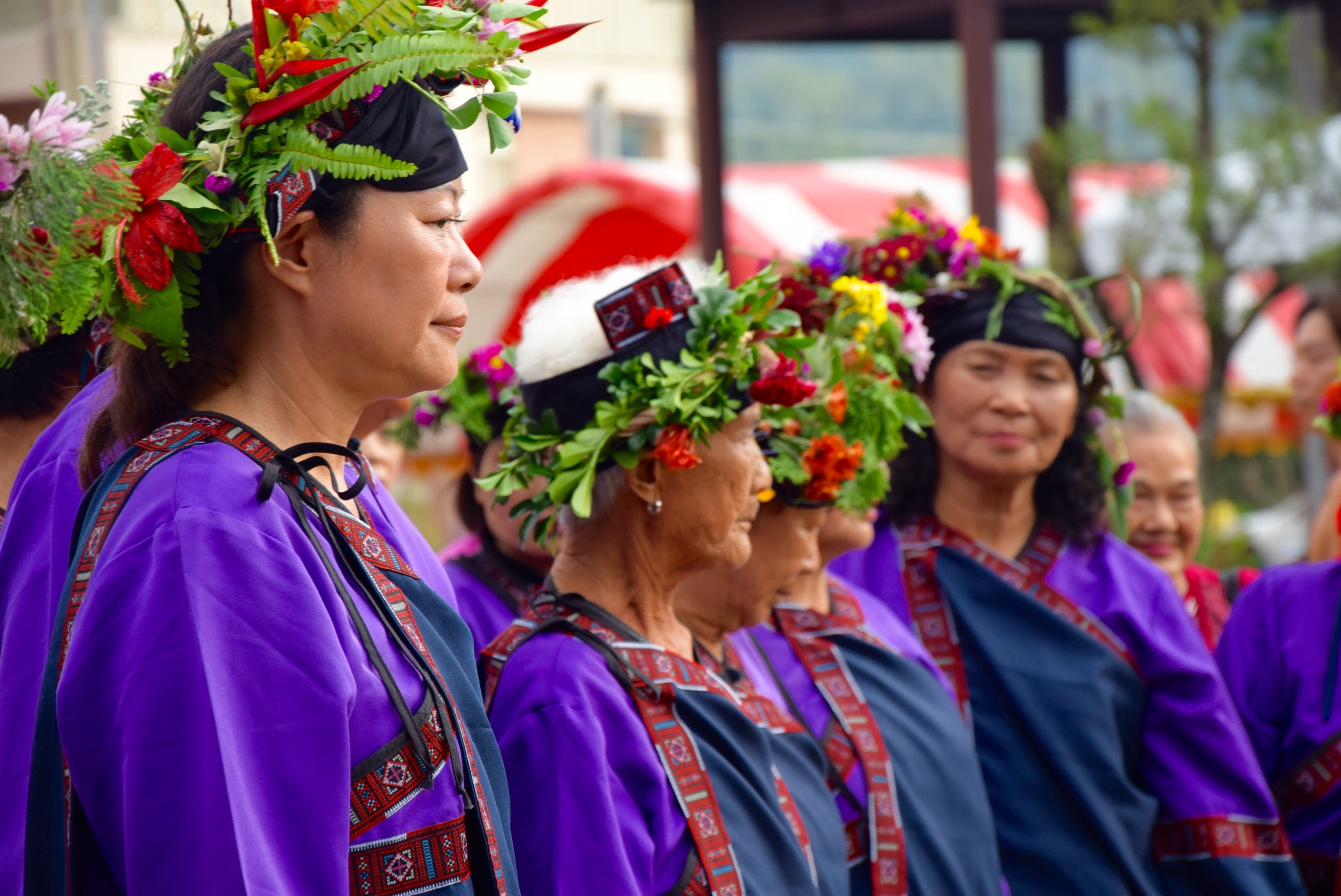 中文（台灣）: 高雄小林村大武壠族人於夜祭穿著傳統服飾。